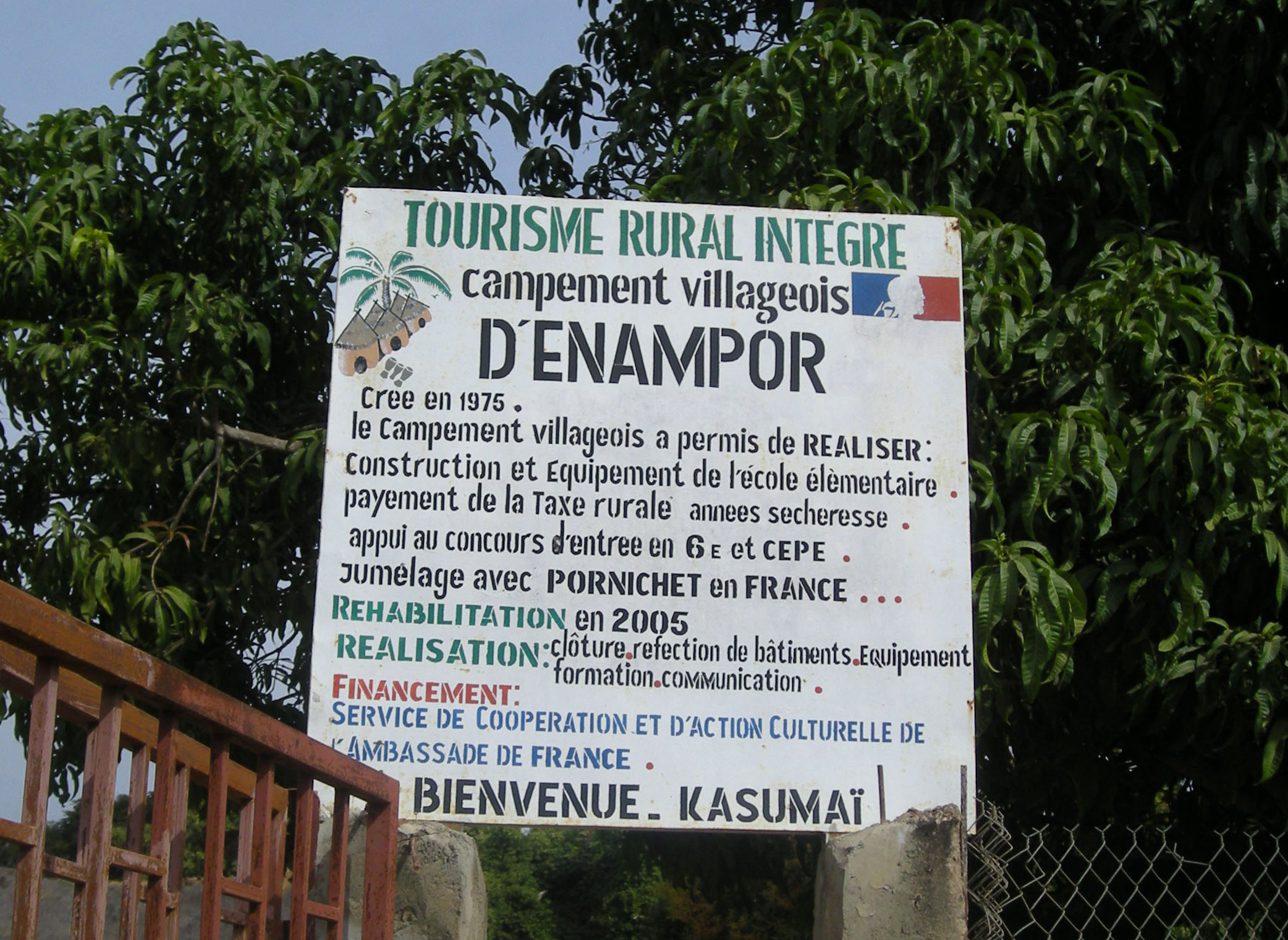 Campement villageois intégré d'Enampor (Casamance, Sénégal)